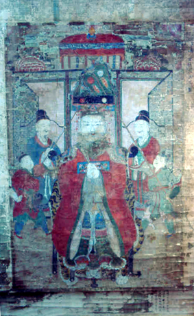 합천 해인사 세조존상도(합천 해인사 소장) 1458년 7월 28일 윤사로, 조석문 등의 건의로 제작한 조선 세조의 영정 2003년 9월 18일 경상남도 문화재자료 제331호 지정